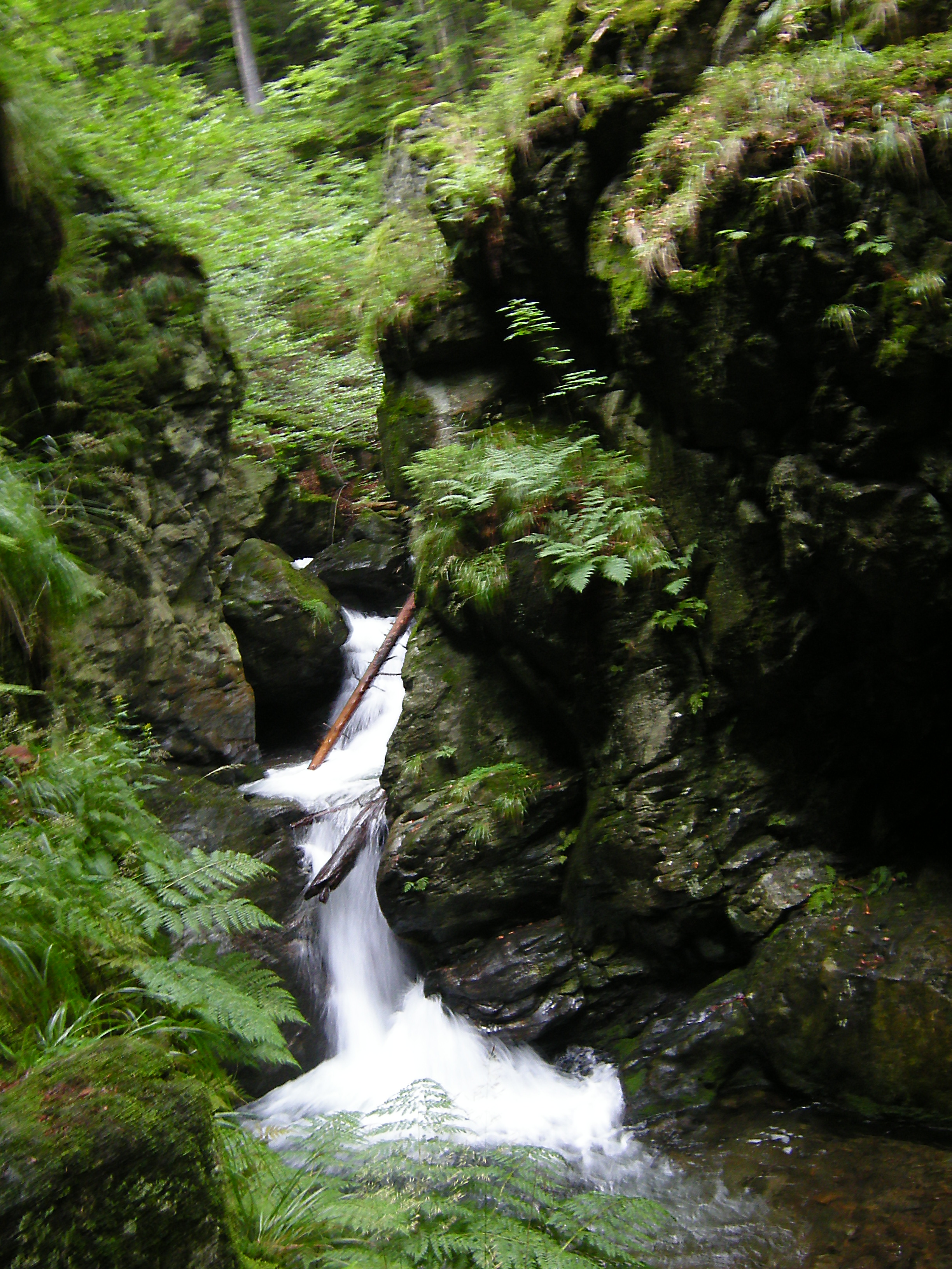 Wodospady srebrnego potoku